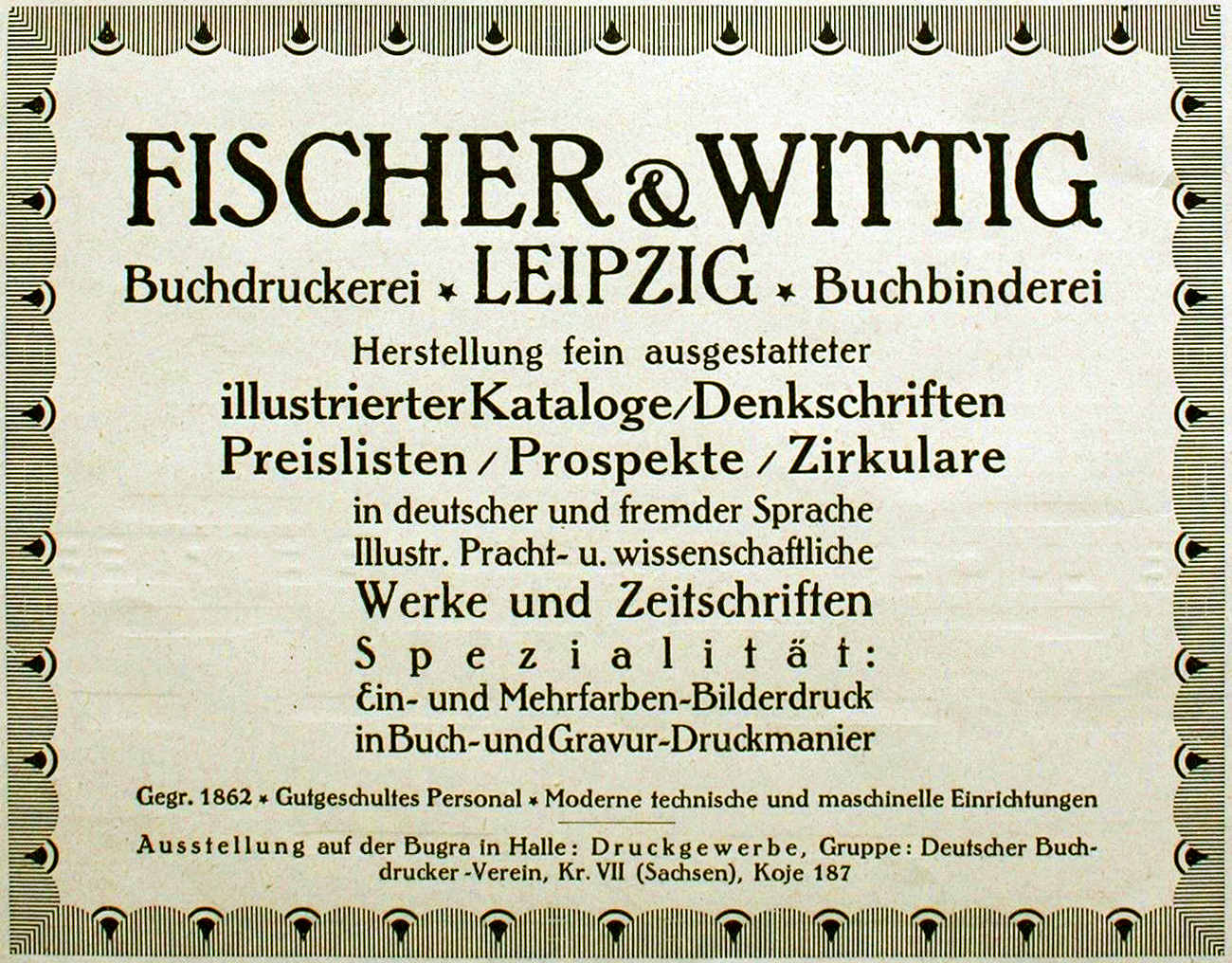 Werbeanzeige anlässlich der Internationalen Ausstellung für Buchgewerbe und Graphik Bugra im Jahr 1914 in Leipzig die Leipziger Buchdruckerei und Buchbinderei „Fischer & Wittig“ mit der „Herstellung fein ausgestatteter illustrierter Kataloge / Denkschriften Preislisten / Prospekte / Zirkulare in deutscher und fremder Sprache Illustr. Pracht- u. wissenschaftliche Werke und Zeitschriften Spezialität: Ein- und Mehrfarben-Bilderdruck in Buch- und Gravur-Druckmanier Gegr. 1862. Gut geschultes Personal. Moderne technische und maschinelle Einrichtungen. Ausstellung auf der Bugra in Halle: Druckgewerbe, Gruppe: Deutscher Buch- drucker-Verein, Krs. VII (Sachsen), Koje 187“ In dieser Anzeige empfahl sich das Unternehmen nicht als der Kunstverlag, als der es ebenfalls agierte.